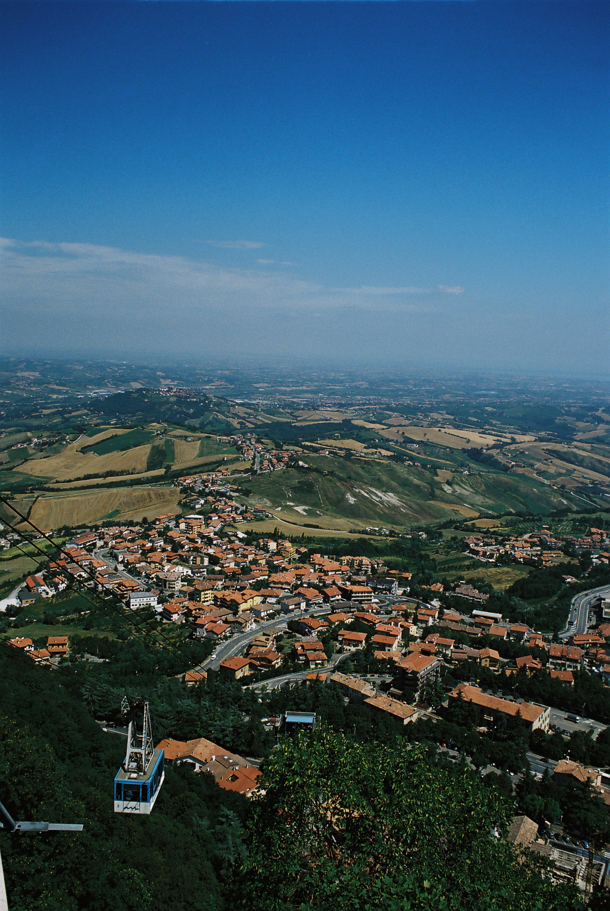 47893 Cailungo, San Marino